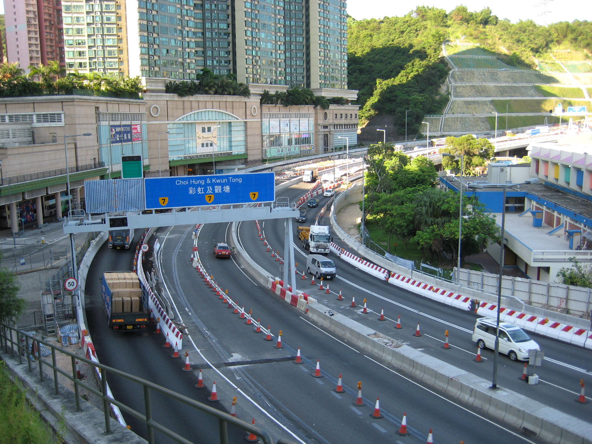 ching cheung road near lai chi kok 呈祥道近荔枝角